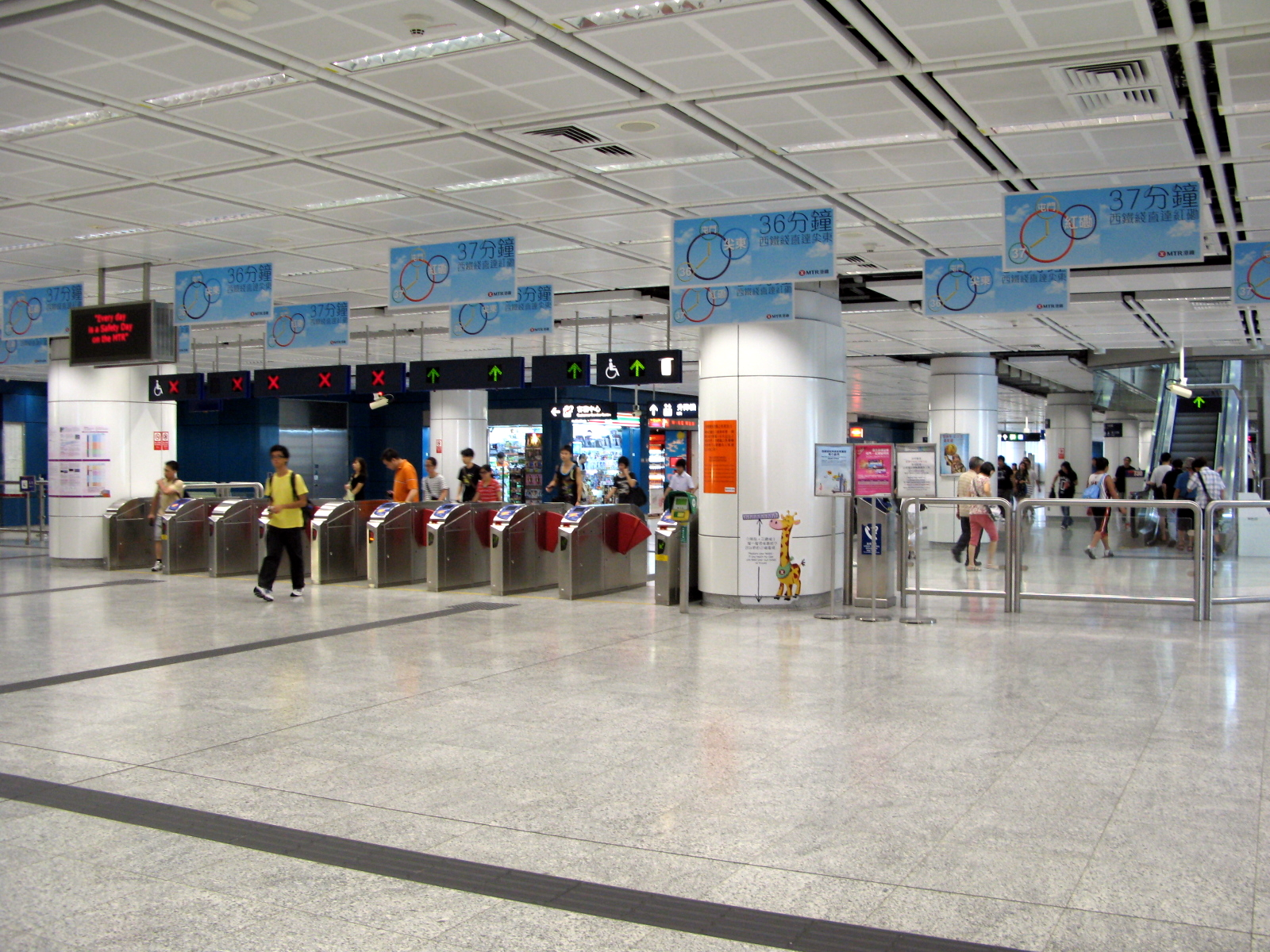 Tuen Mun Station Concourse 屯門站大堂